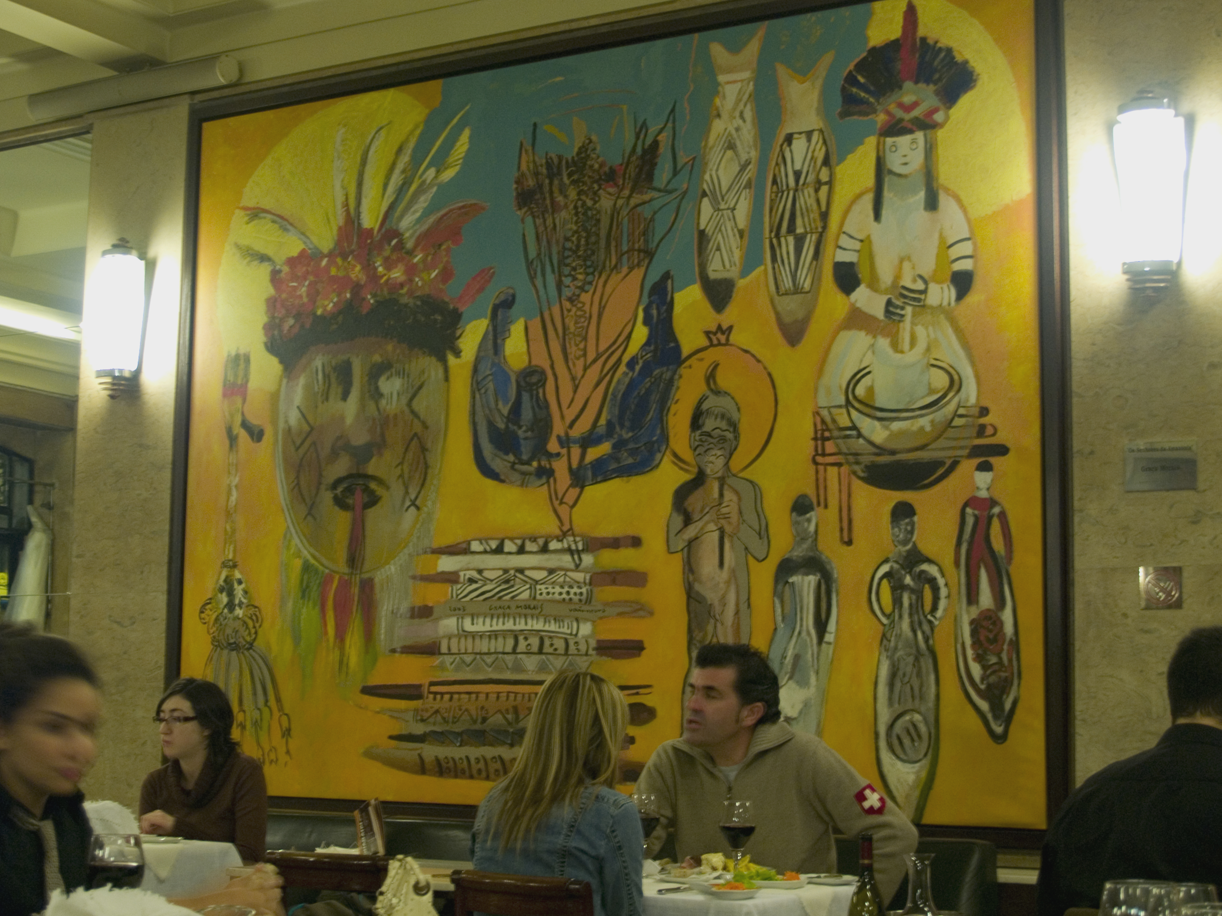 Pintura de Graça Morais